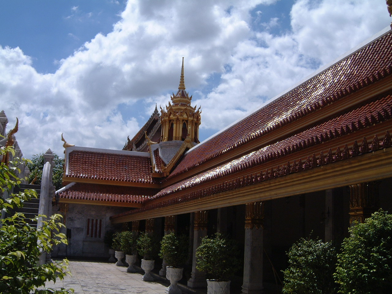 Wat Trithotsathep (วัดตรีทศเทพ วรวิหาร), Bangkok, Thailand